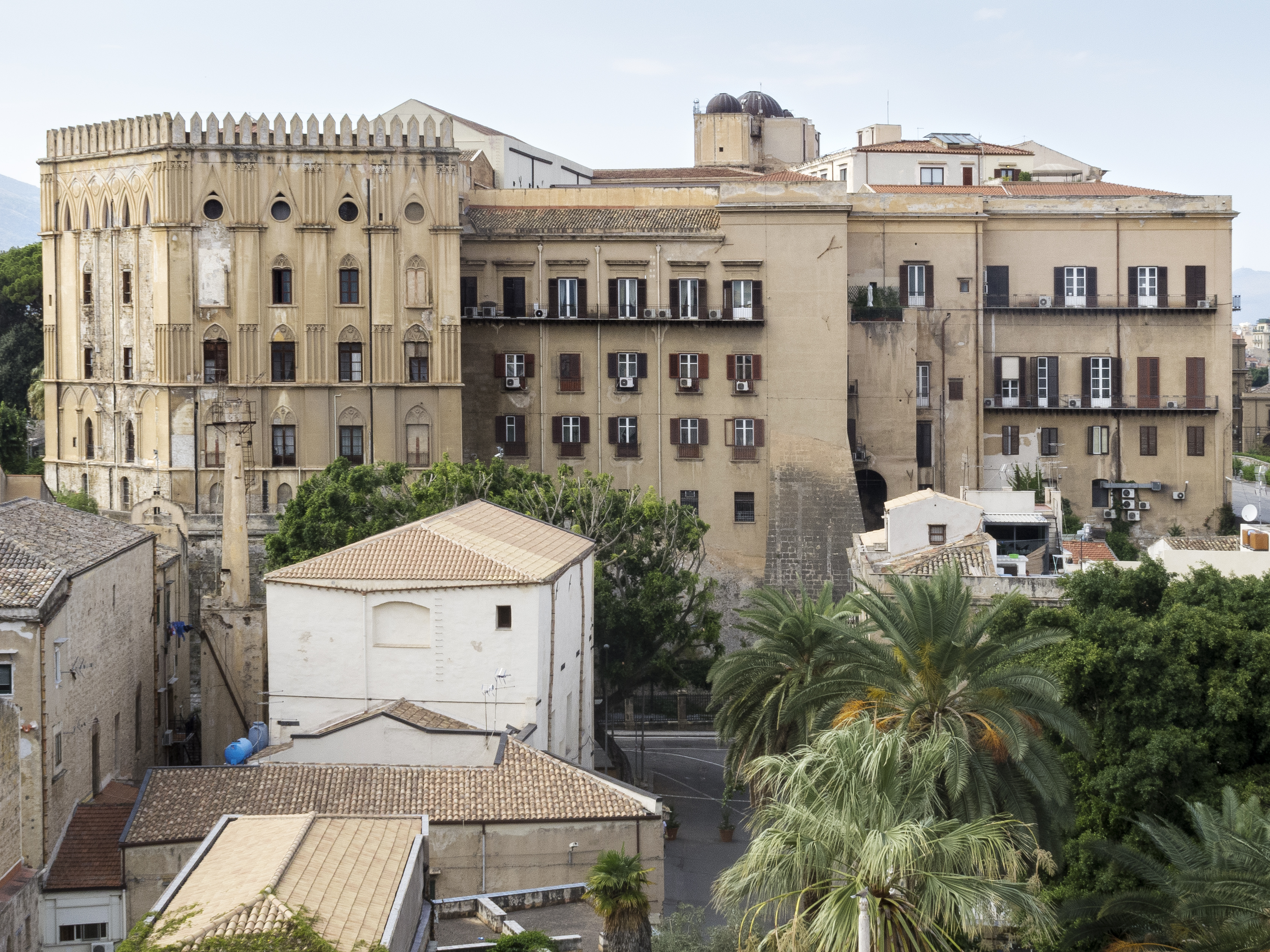 Palais des Normands depuis l'Église Saint-Jean des Ermites (août 2015)